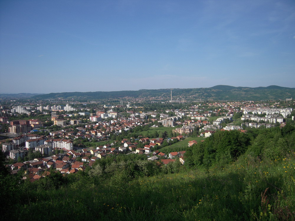 Pogled na Starčevicu